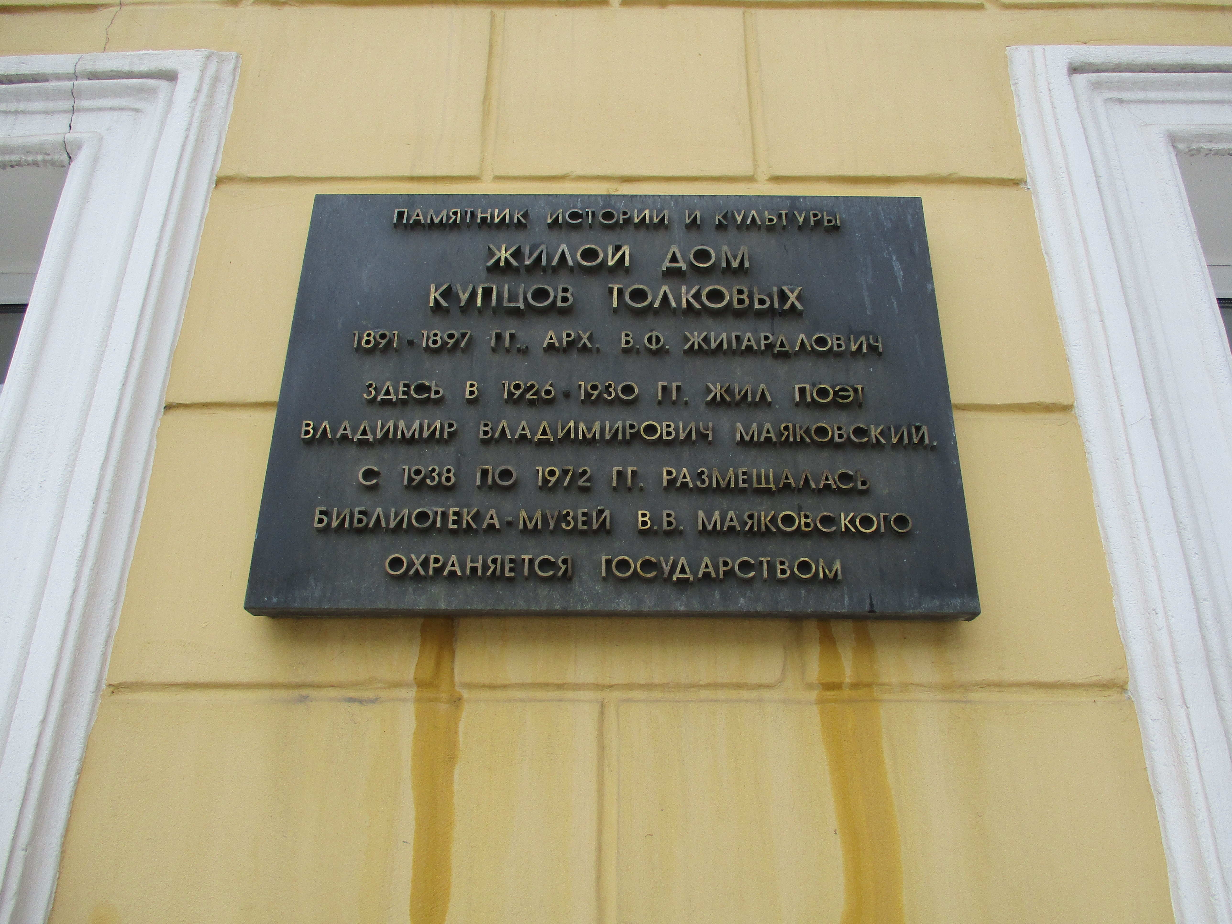 Мемориальная доска посв - Маяковскому В.В, по адресу - пер. Маяковского, 15 дробь 13